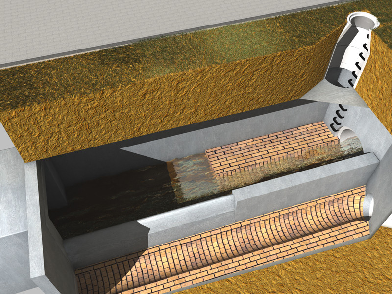 Computergrafik eines Regenüberlaufs- oder Entlastungsbauwerks